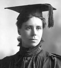 Alice Bache Gould (1868-1953), historiadora, hispanista i matemàtica nord-americana